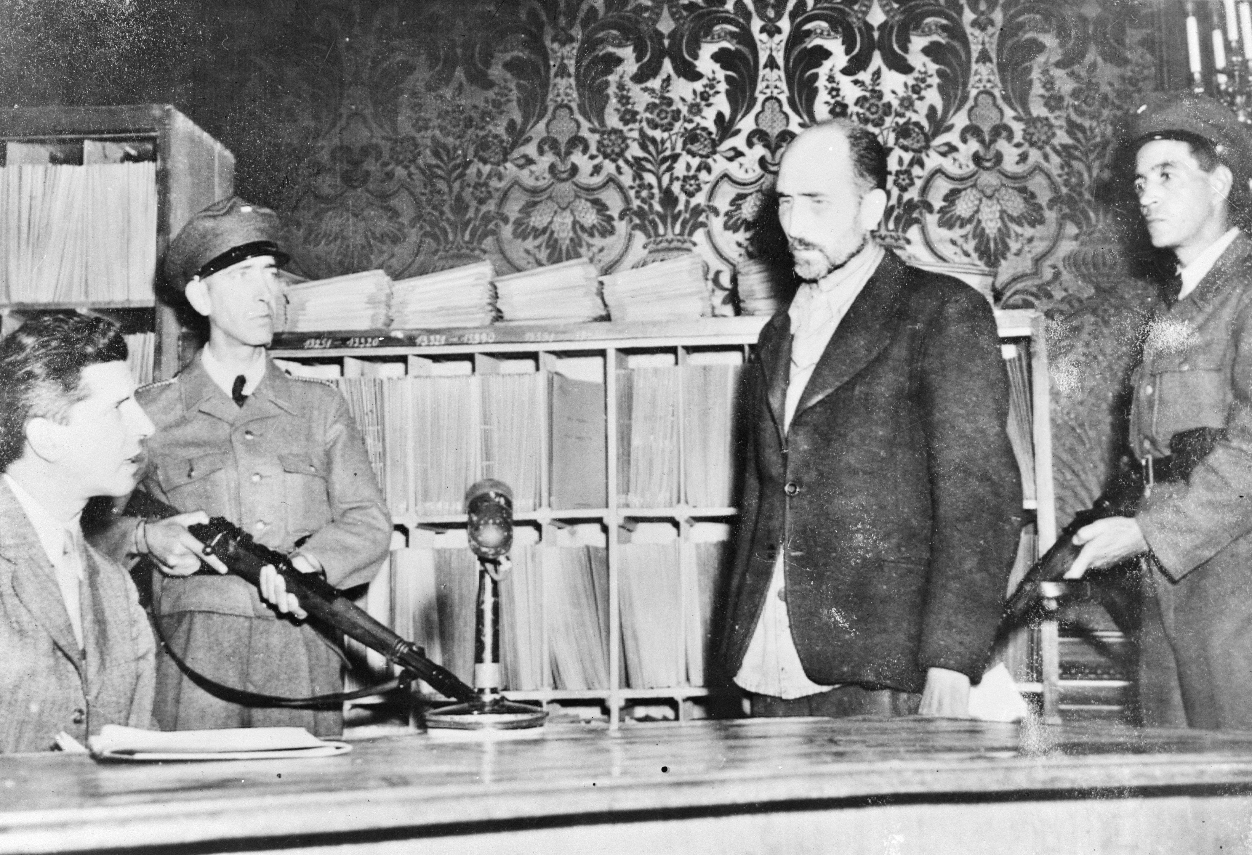 Collectie / Archief : Fotocollectie Anefo Reportage / Serie : [ onbekend ] Beschrijving : "De beul van Auschwitz" [ Maximilian Grabner (staand) leider van de Politieke Afdelng van concentratiekamp Auschwitz wordt ondervraagd door dr Heinrich Dumayer, hoofd van de Weense politie en oud-geïnterneerde van Auschwitz] Annotatie : Repronegatief. De ondervraging vond begin september 1945 plaats. De repro is gedateerd 28-12-1945. In twee kranten op 3 en 5 januari 1946 is deze foto gepubliceerd. Grabner heeft dan in beide onderschriften een verkeerde voornaam (nl. Wilhelm) en wordt hij foutief commandant van Auschwitz genoemd. Grabner werd in december 1947 in Polen ter dood veroordeeld en in januari 1948 opgehangen Datum : september 1945 Locatie : Wenen Trefwoorden : oorlogsmisdadigers, rechtspraak, tweede wereldoorlog Persoonsnaam : Dumayer, Heinrich, Grabner, Maximilian Fotograaf : Fotograaf Onbekend / Anefo Auteursrechthebbende : Nationaal Archief Materiaalsoort : Negatief (zwart/wit) Nummer archiefinventaris : bekijk toegang 2.24.01.04 Bestanddeelnummer : 901-2954